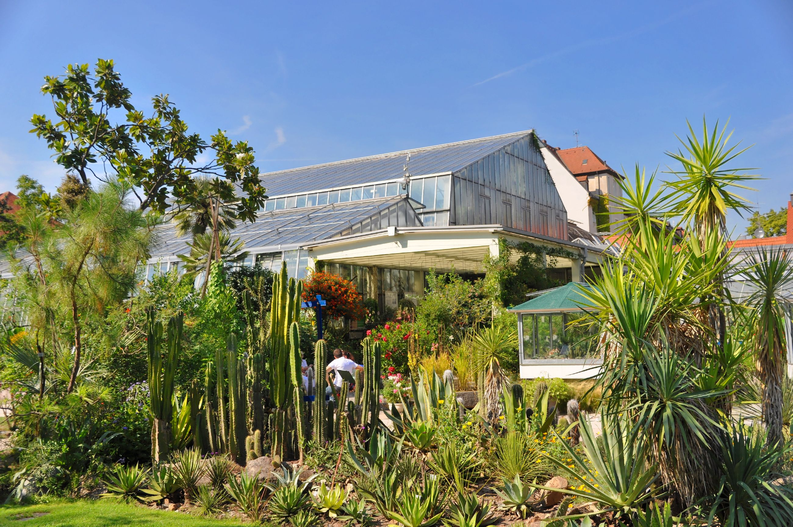 Wikipedia 13. Fotoworkshop; Bilder aus dem Botanischer Garten Erlangen